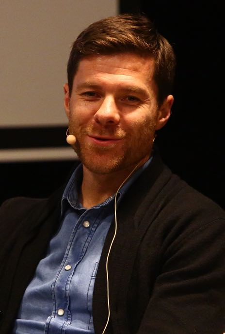 Elkarrizketatzailea/Entrevistador: Manuel Jabois Ernest Lluch kultur etxea 2018/2/19 Argazkiak/Fotos:Real Sociedad